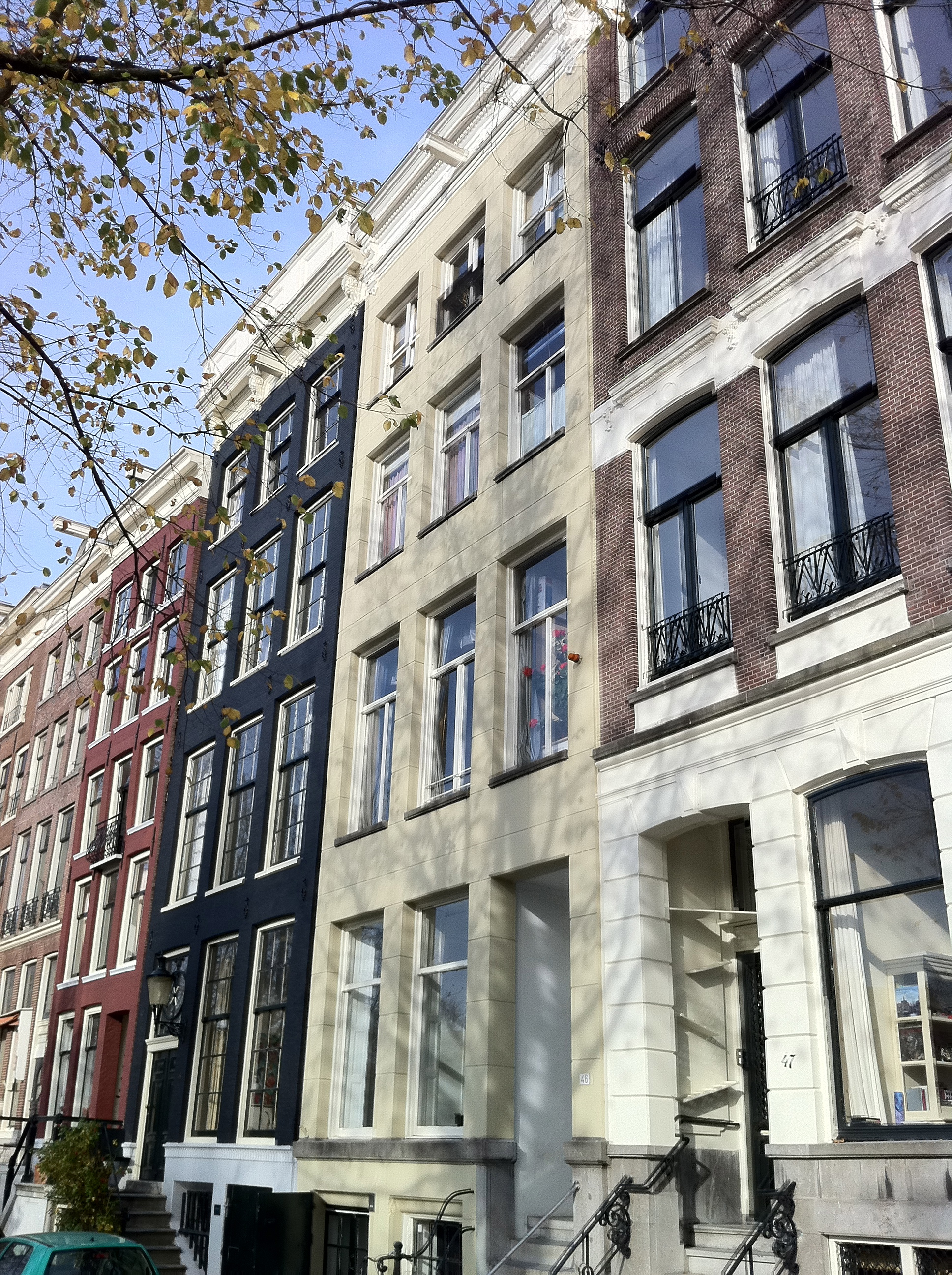 Amsterdam - Binnenkant 46